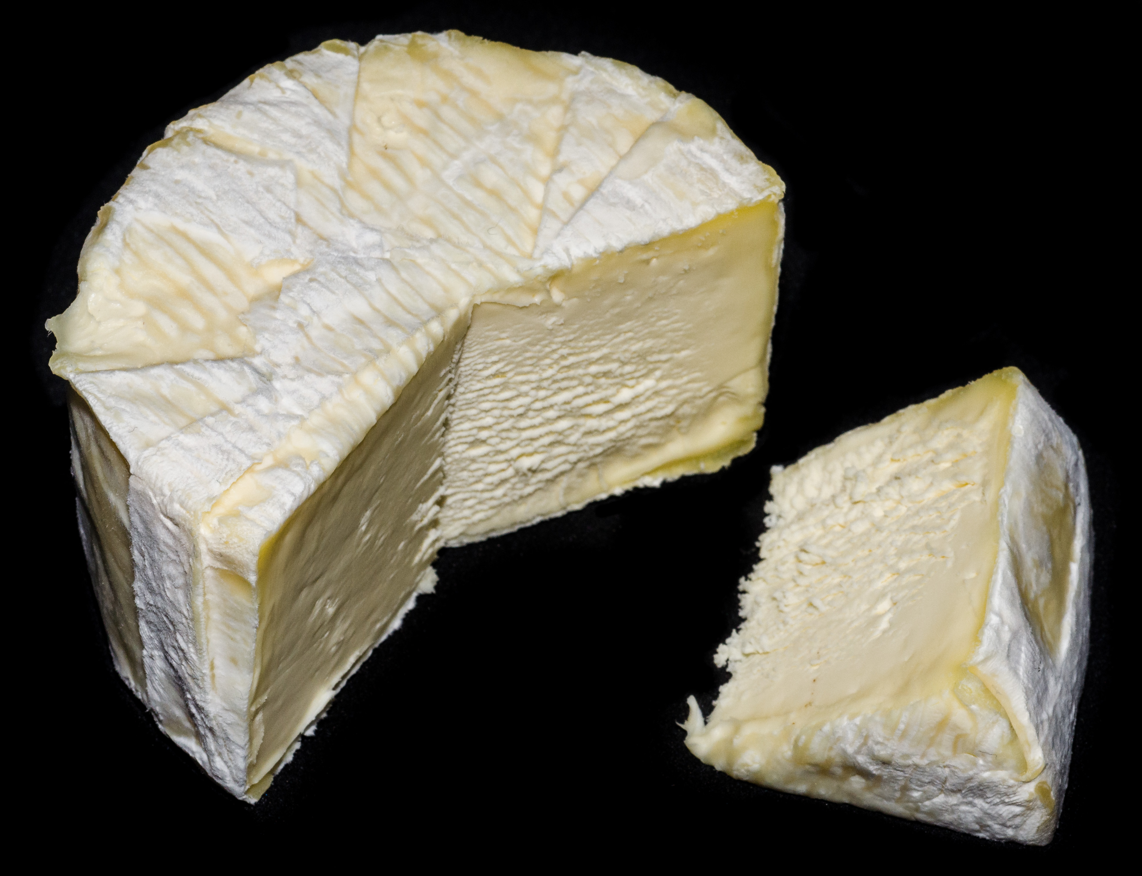 Brillat-Savarin frais